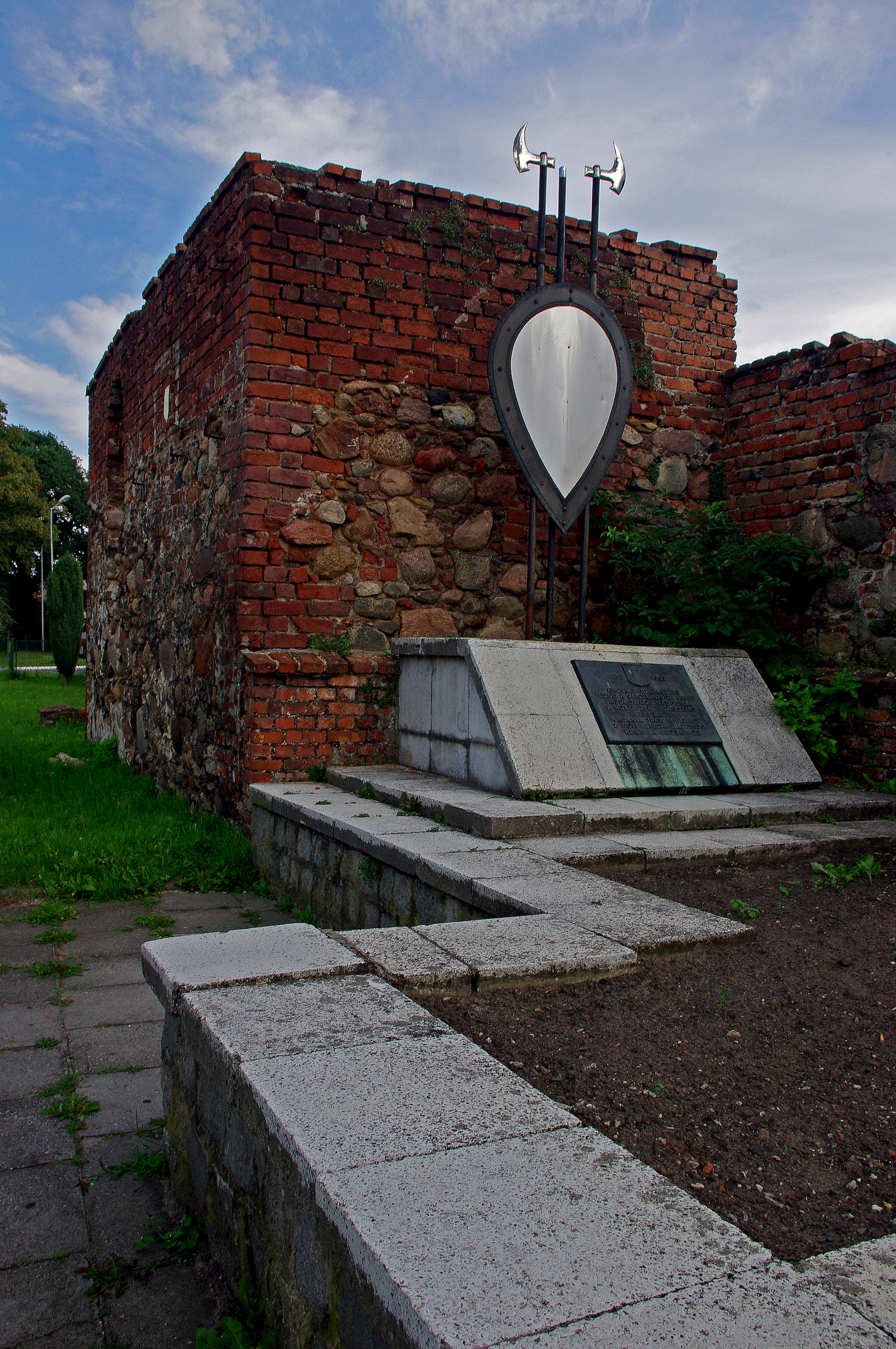 mury obronne, XIV Krosno Odrzańskie, Krosno Odrzańskie 04.1961.